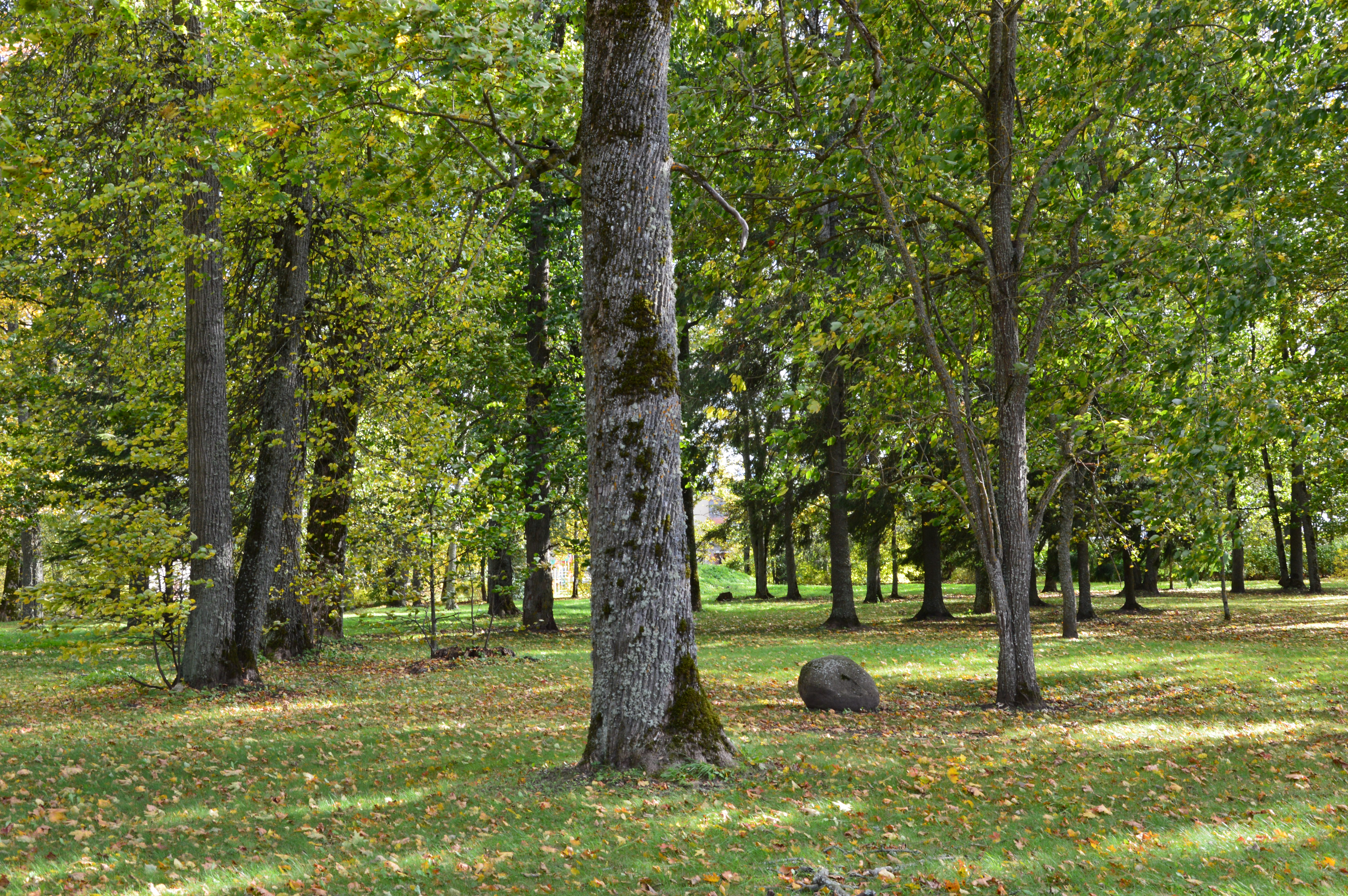 Kurtna mõisa park